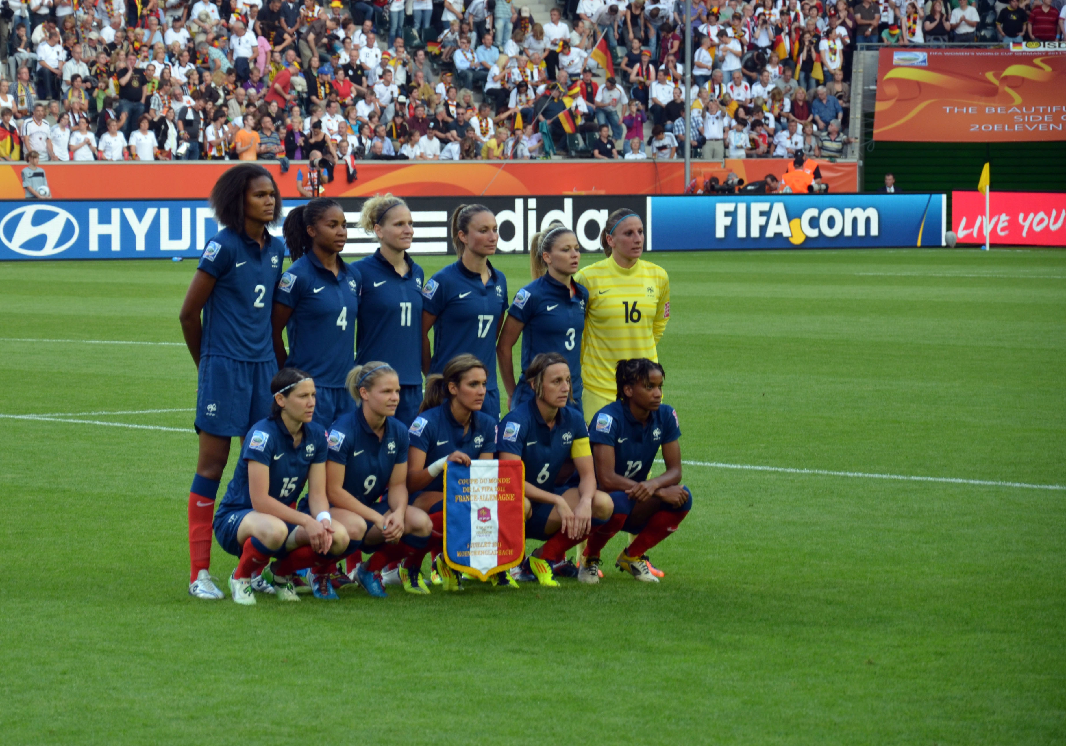 WM Vorrundenspiel zwischen Frankreich und Deutschland am 5. Juli 2011 im Borussiapark in Mönchengladbach Hinten v.l.n.r.: Renard, Georges, Lepailleur, Thiney, Boulleau, Sapowicz; Vorne v.l.n.r.: Bussaglia, Le Sommer, Nécib, Soubeyrand, Thomis